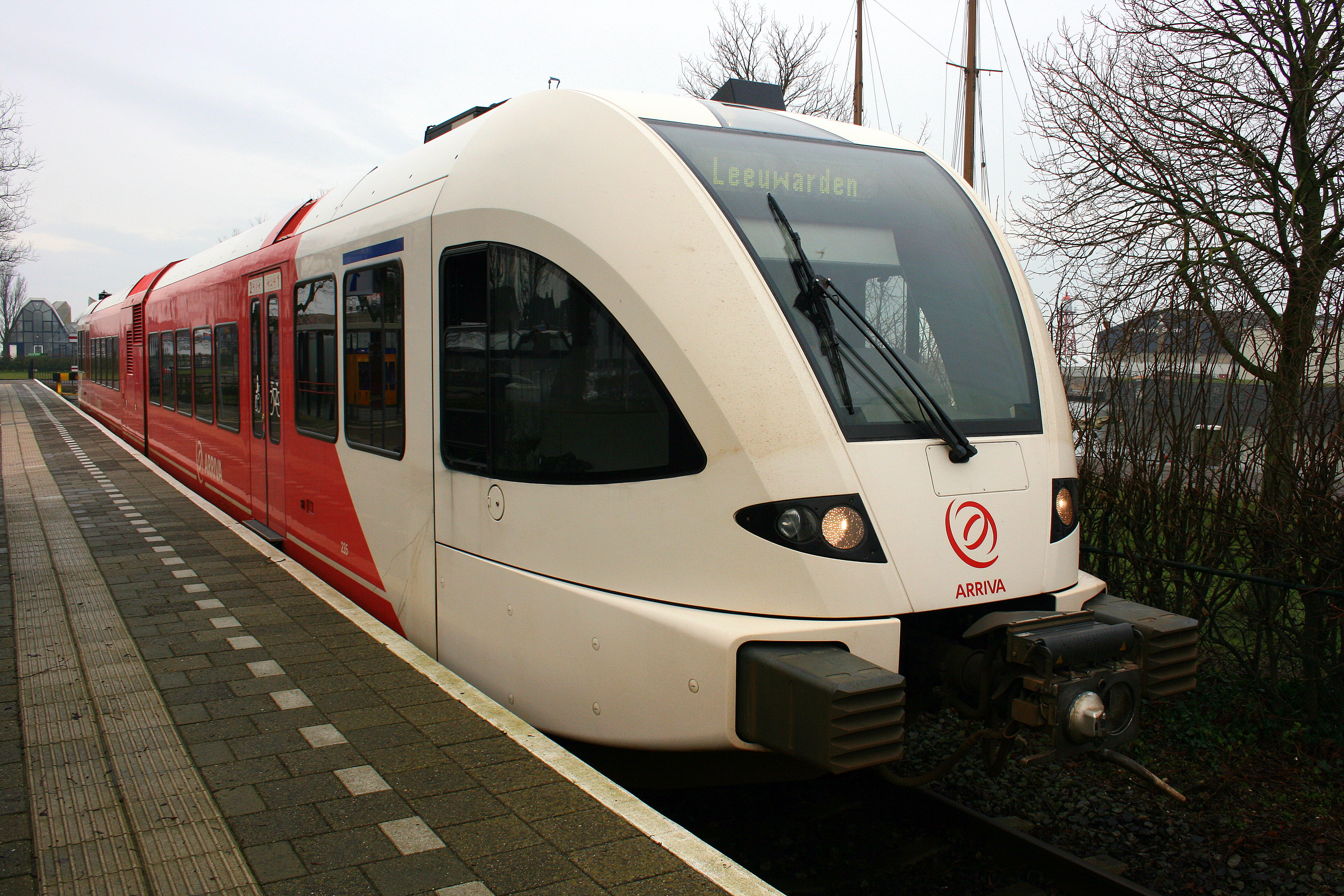 Leeg aangekomen, leeg weer vertrokken om 11:04 richting Leeuwarden.